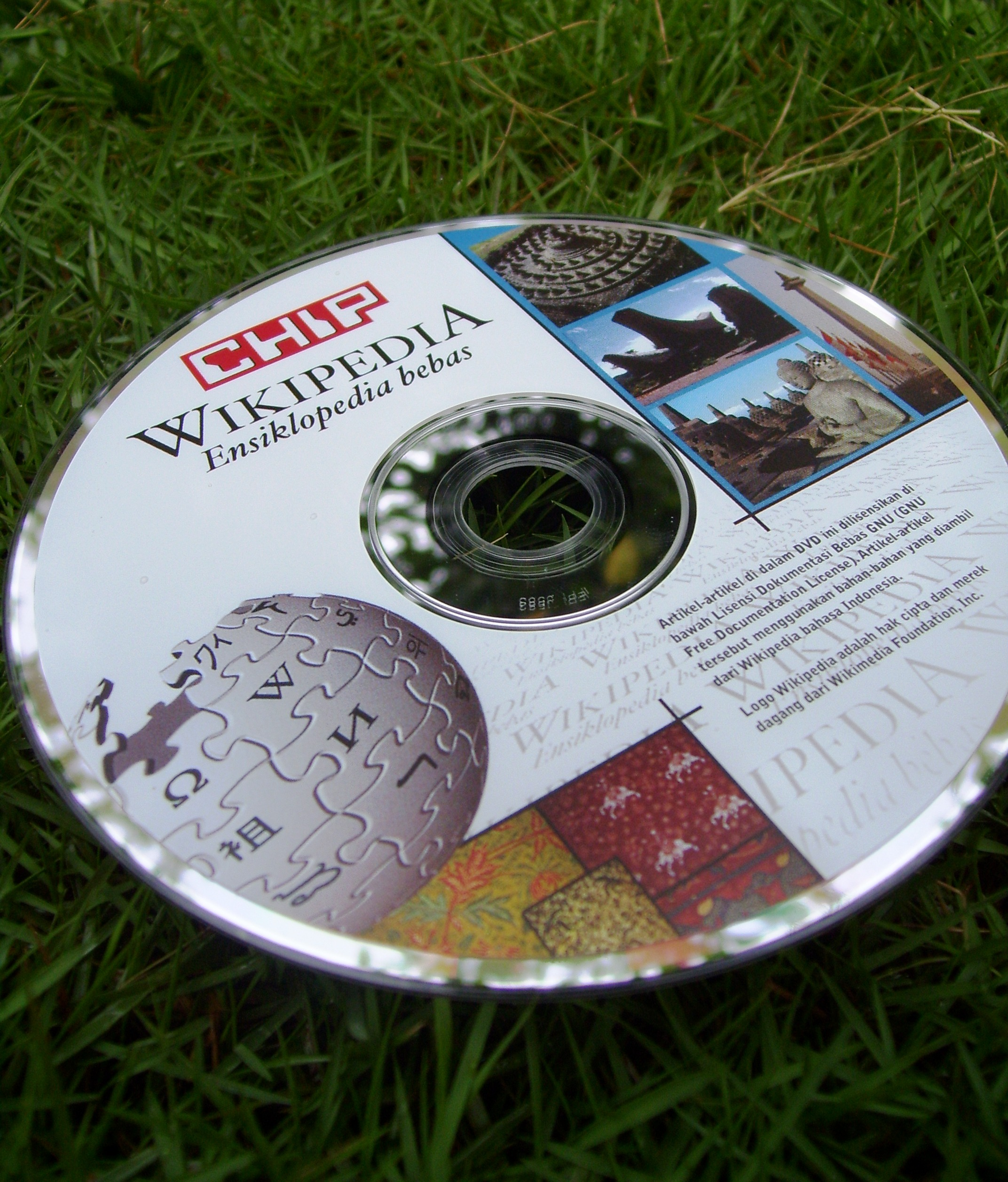 Majalah Chip Wikipedia Bahasa Indonesia DVD